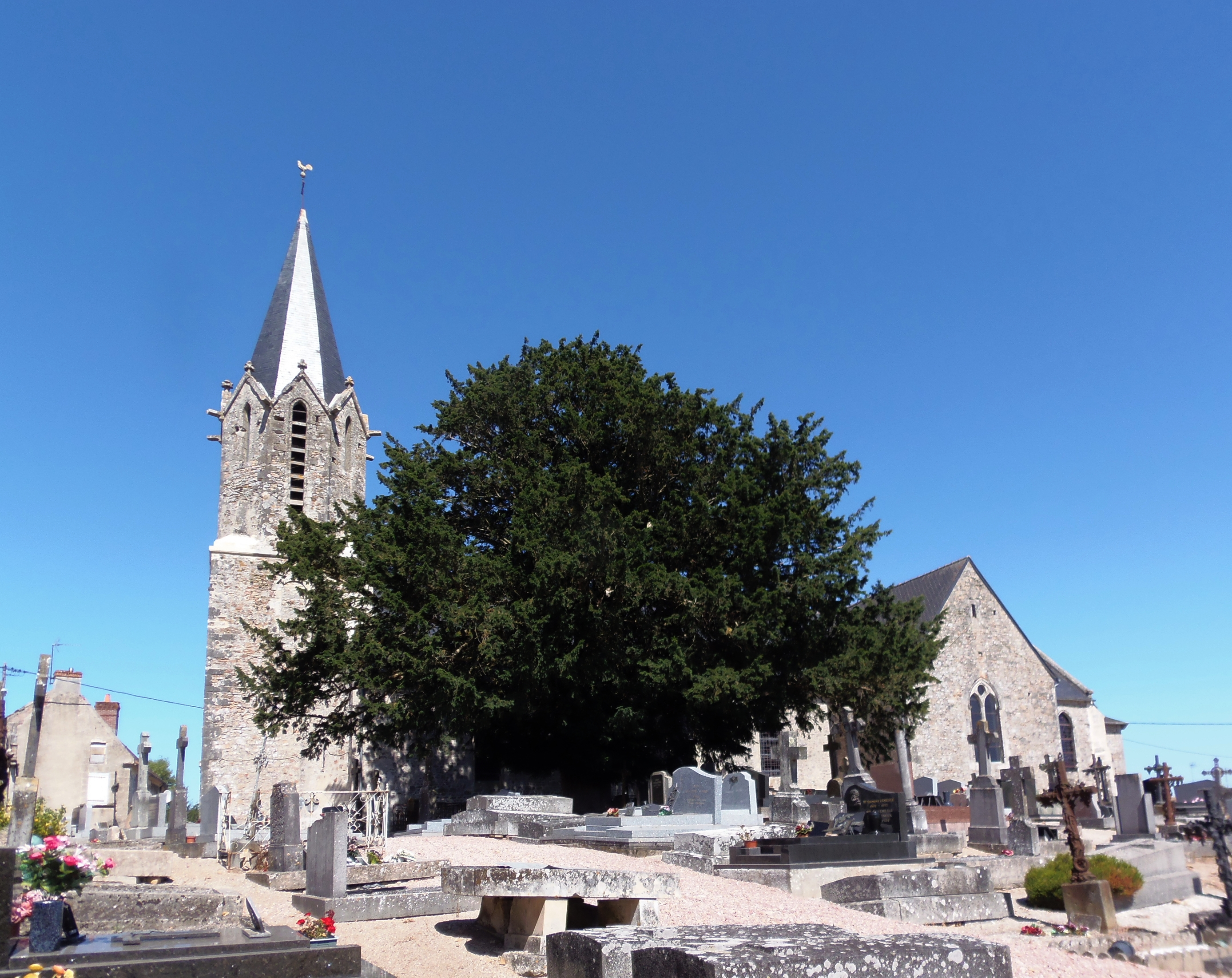 Nécy (Normandie, France). L'église Saint-Brice.